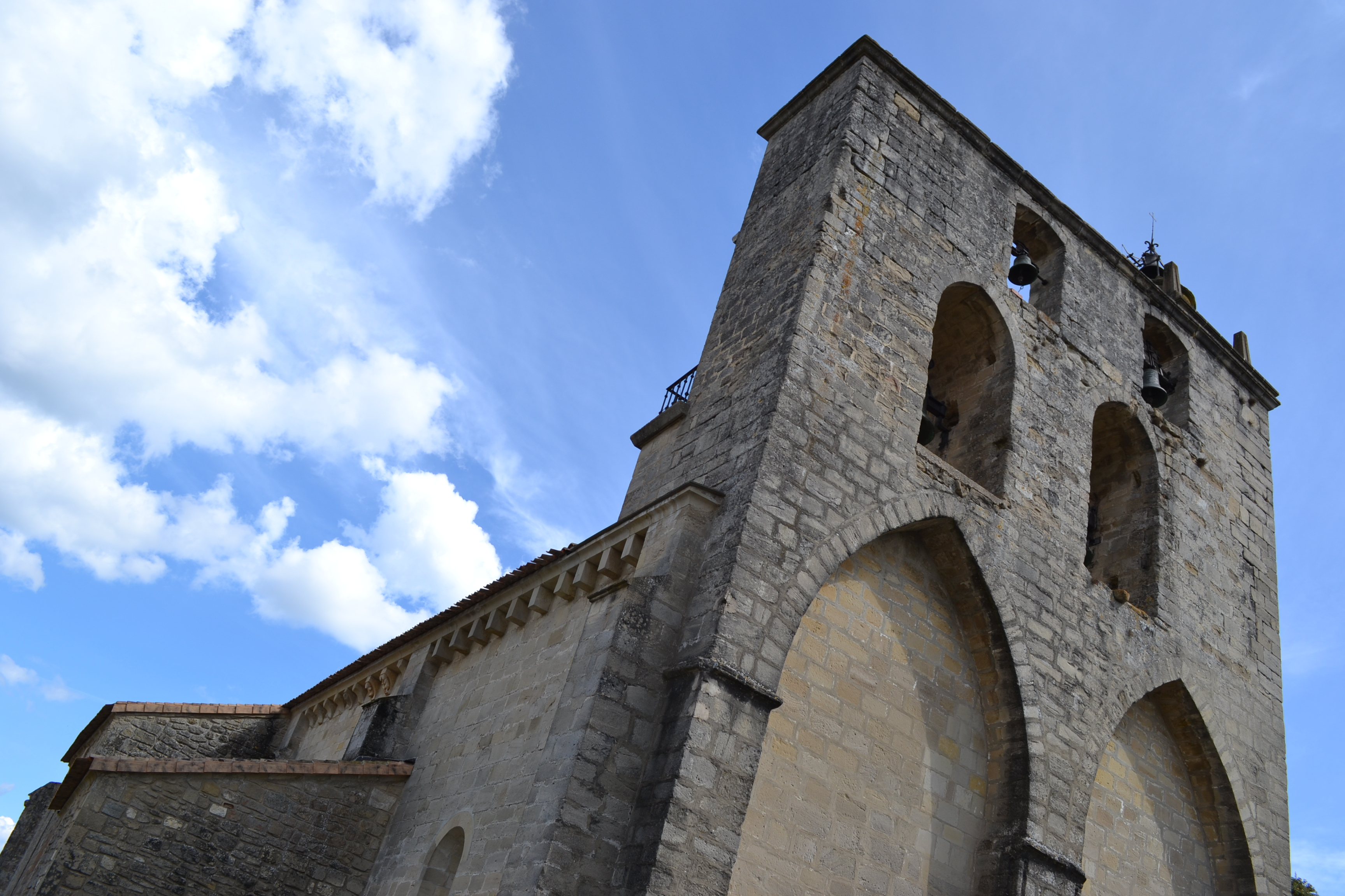 vista general